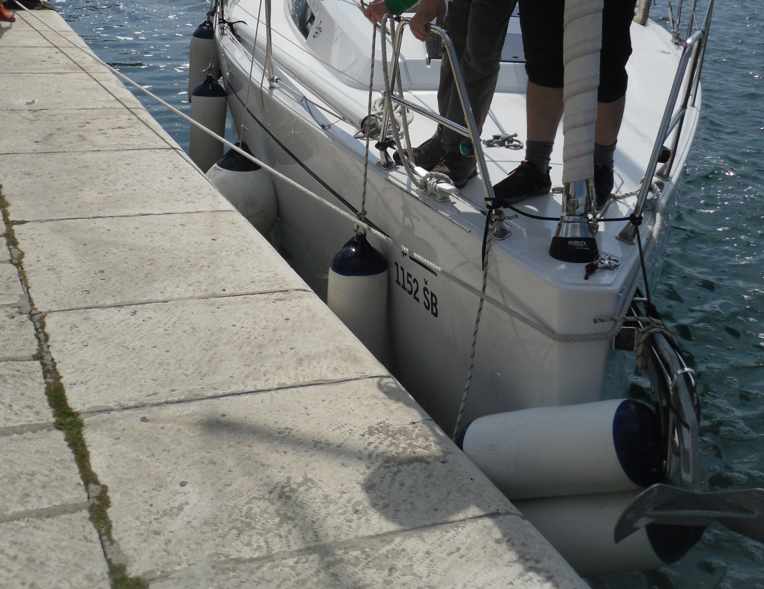 Abbildung zur richtigen Vorspringführung